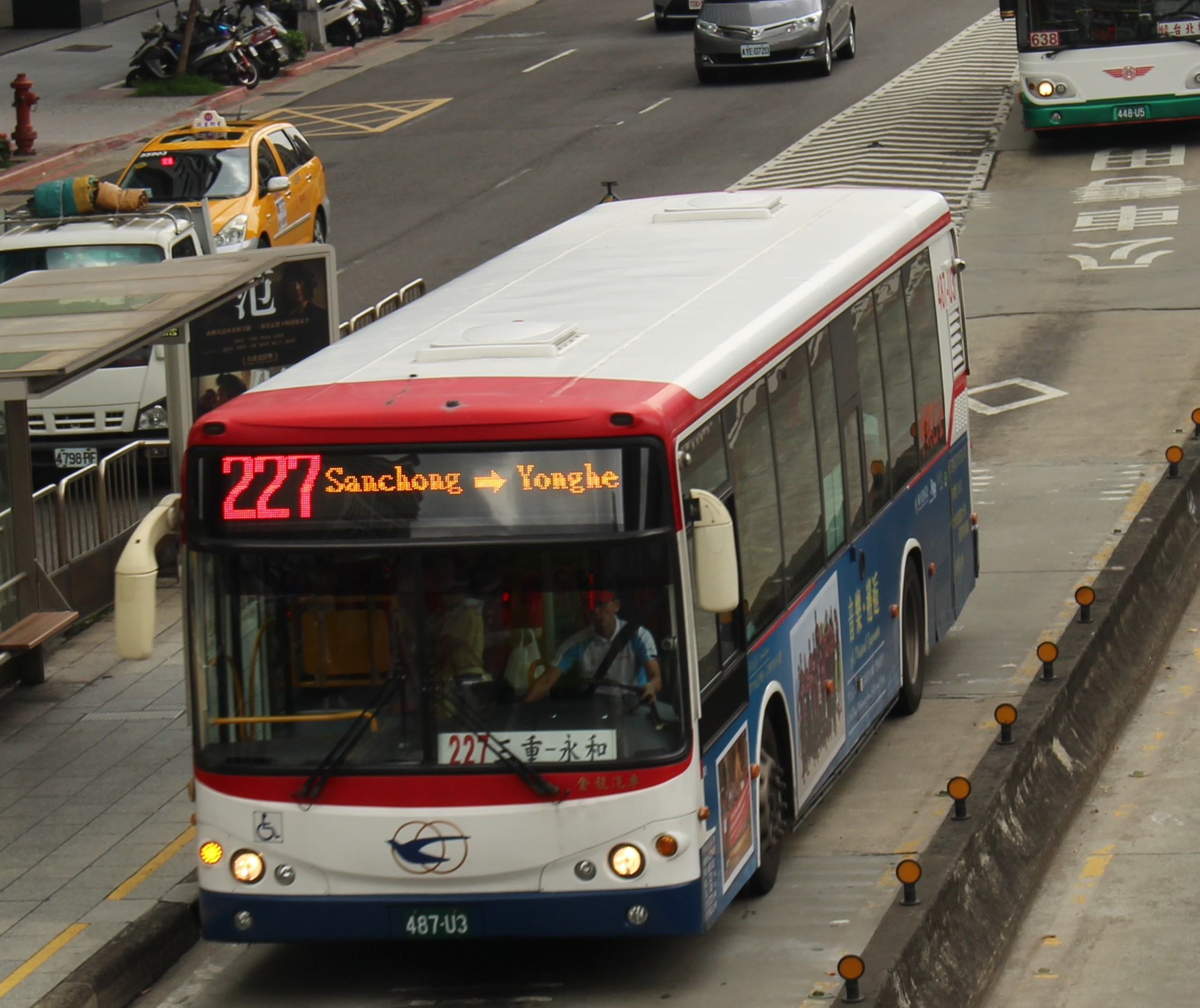 中興巴士2014 KINGLONG KL6112U1五期 487-U3 227